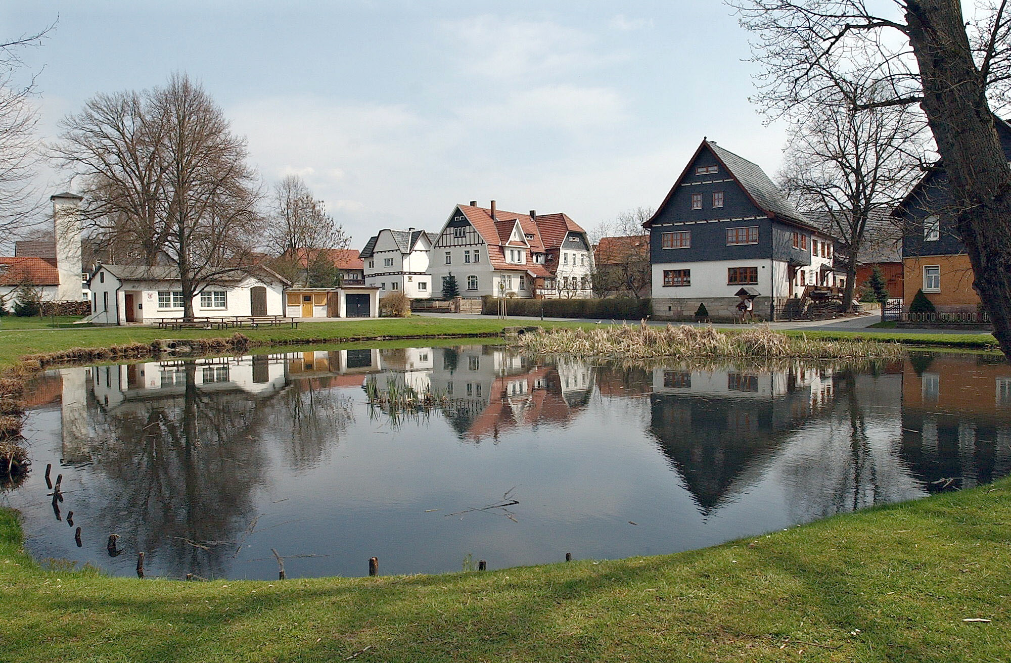 Hönbach am Oberen Dorfteich aus Westen aufgenommen zeigt von links: Feuerwehrgerätehaus, Feuerwehrvereinsheim mit Gemeindebackofen, ehemalige Gastwirtschaft u. Bauernhäuser.